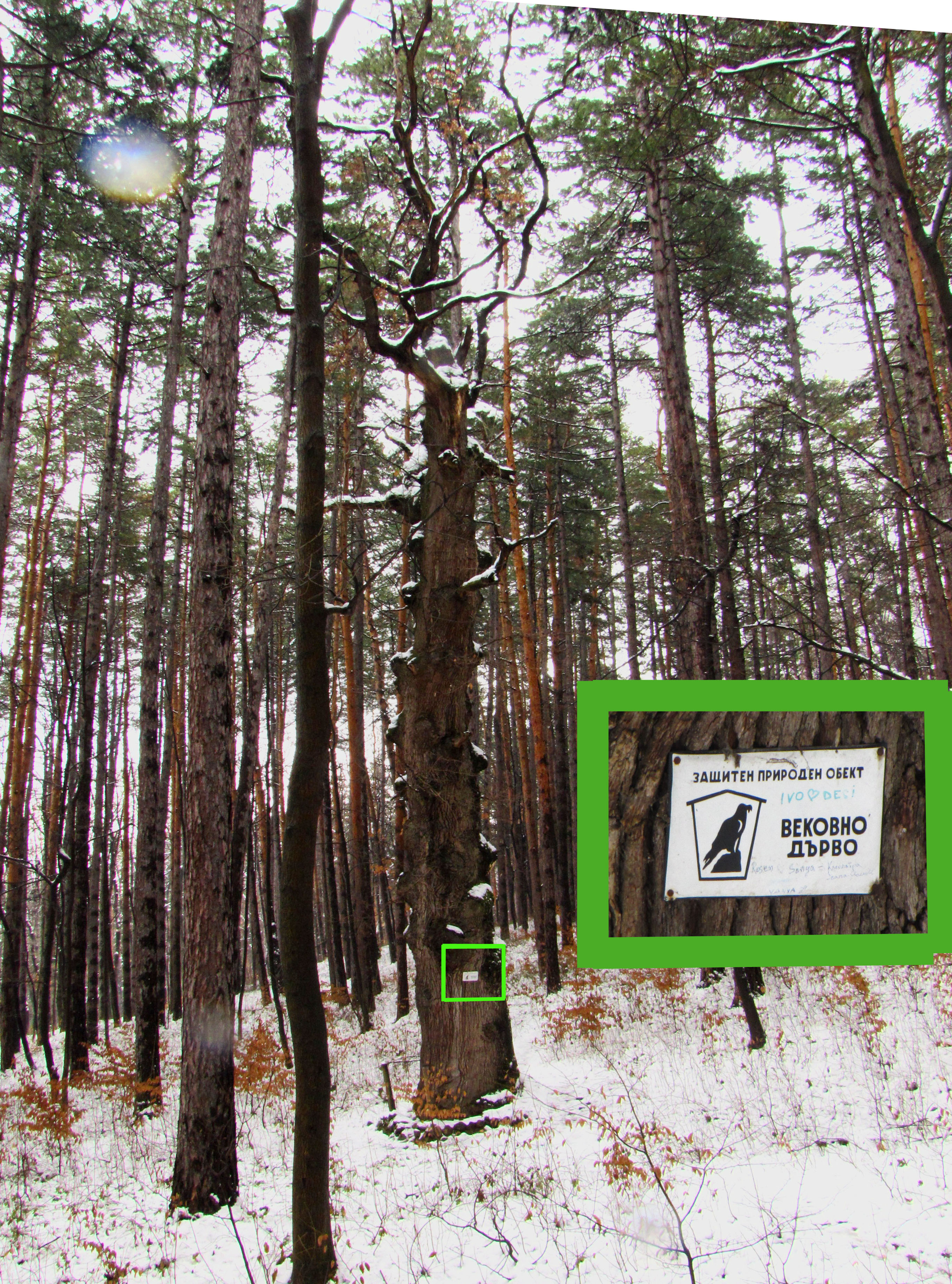 Вековно дърво в Княжевска борова гора